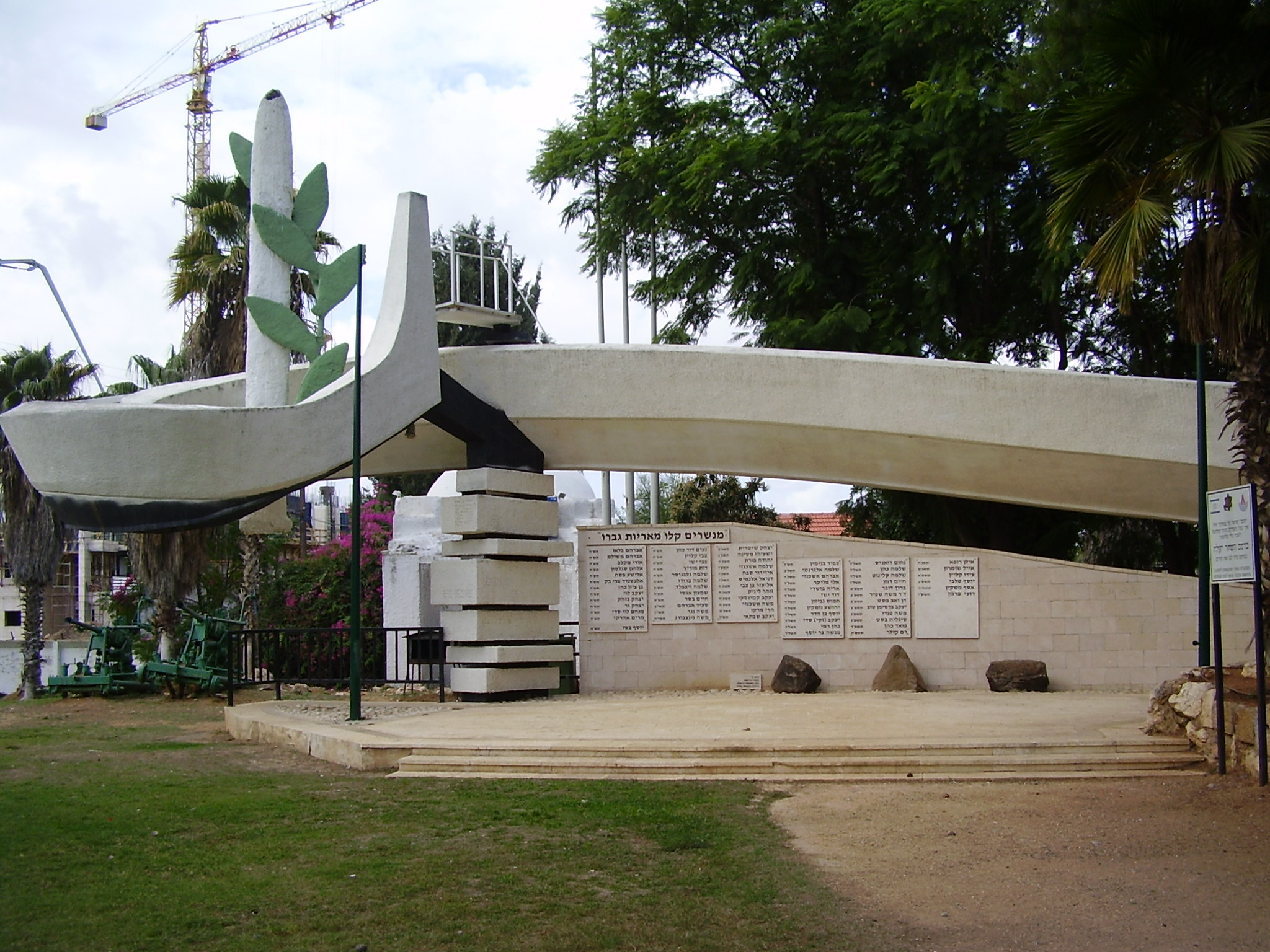 war memorial in yehud, israel אנדרטה לחללי מערכות ישראל ביהוד, ישראל